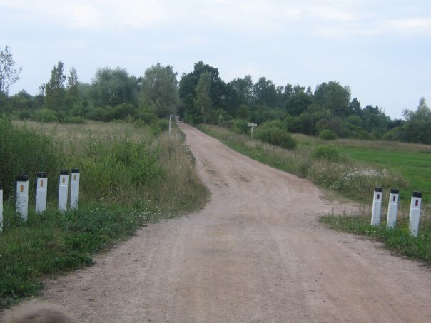 переезд